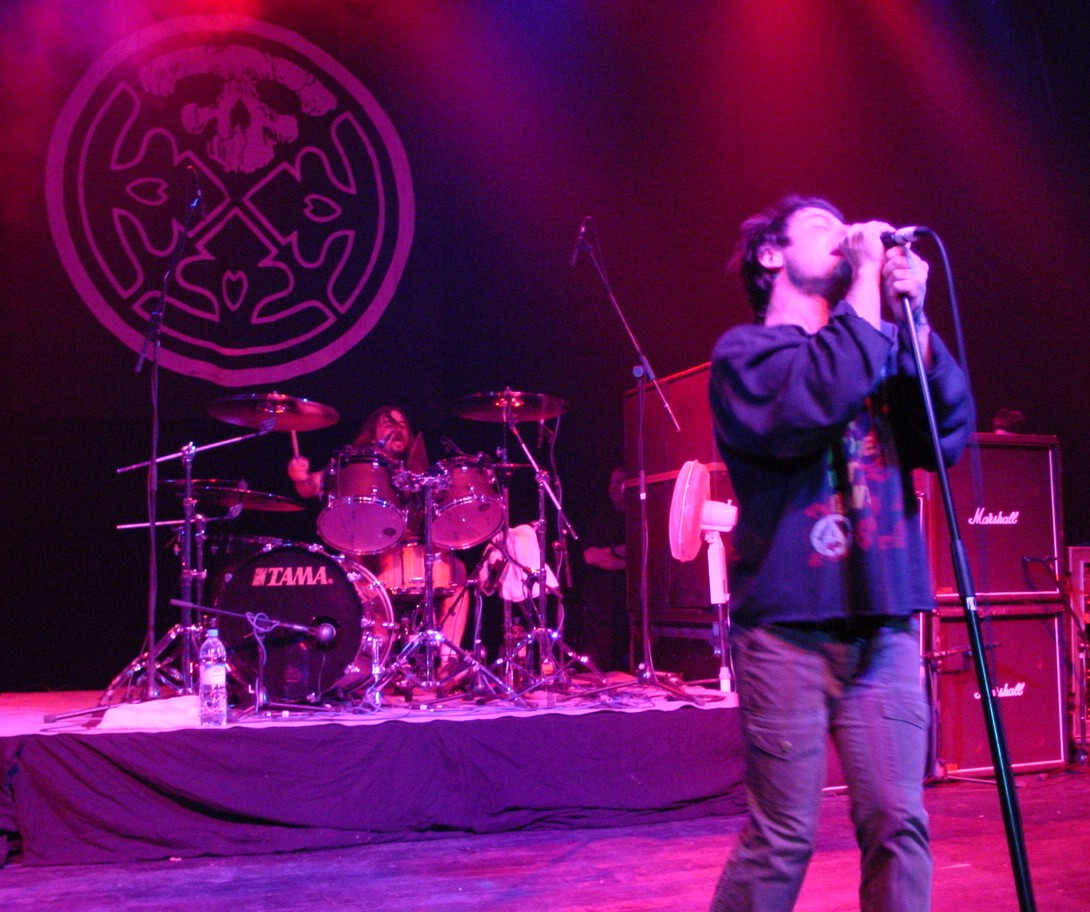 Life Of Agony im Offenbacher Capitol, 19.10.2003